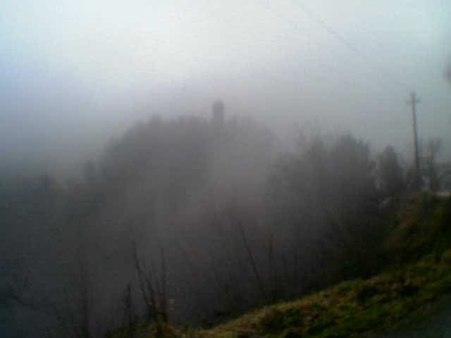 Sant'Anna di Stazzema, a foggy day; see also Massacre of Sant'Anna di Stazzema Sant'Anna di Stazzema, un giono di nebbia; vedi anche Eccidio di Sant'Anna di Stazzema